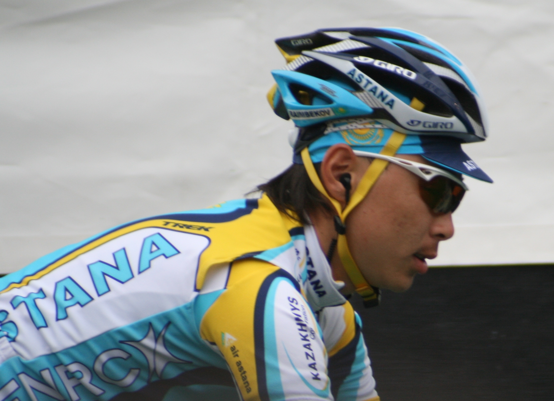 Bolat Raimbekov, au départ du Tour des Flandres 2009